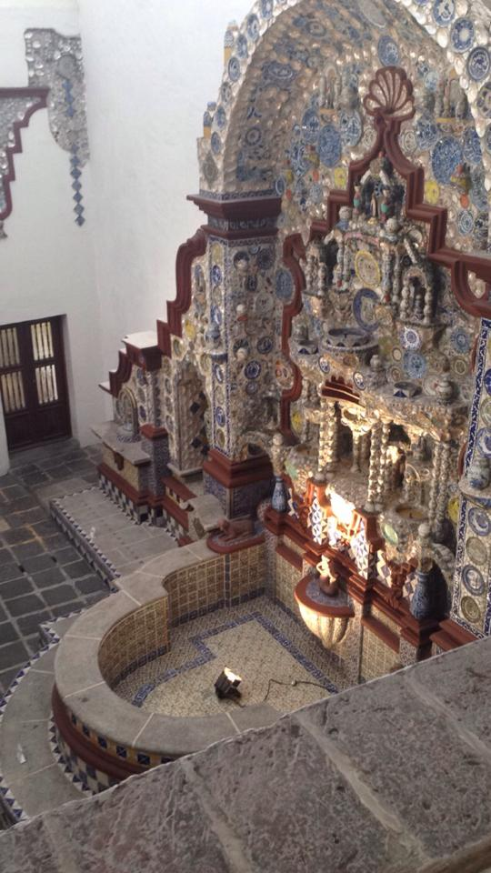 Fuente en el interior de casa Risco , San Ángel CDMX